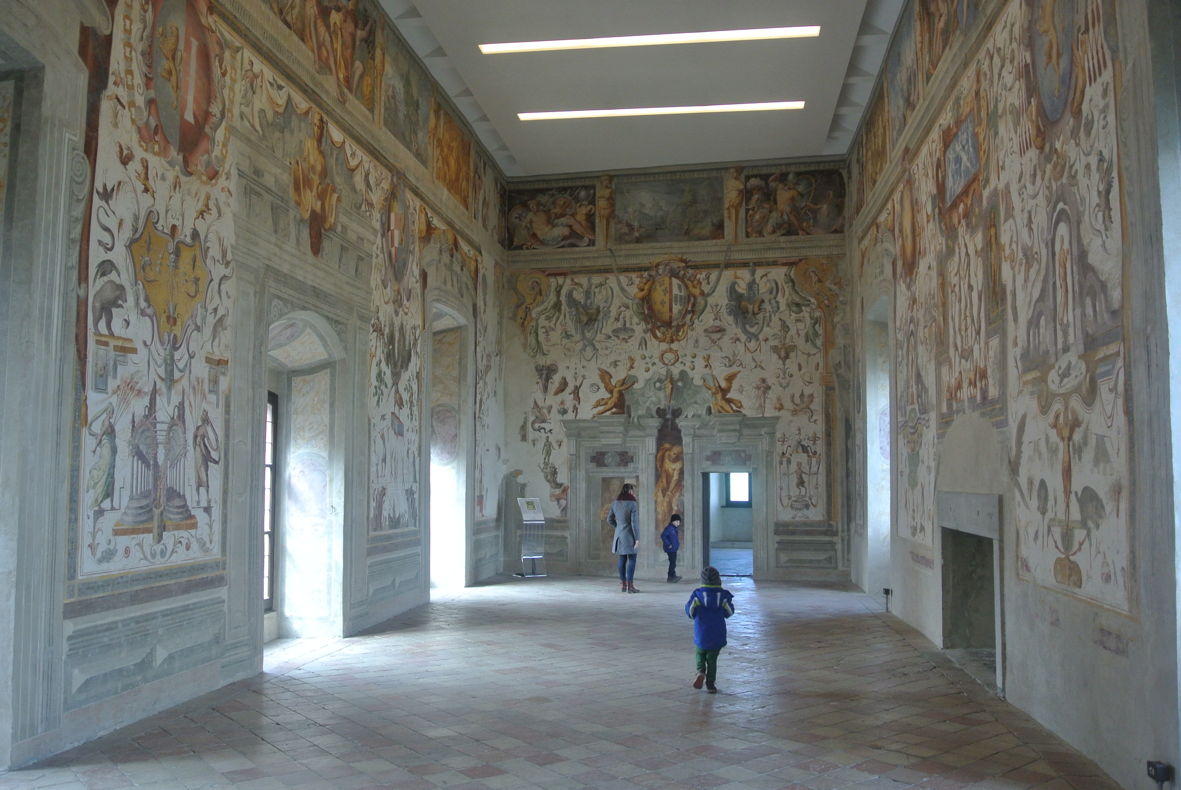 Sala dei Giocolieri o degli Acrobati